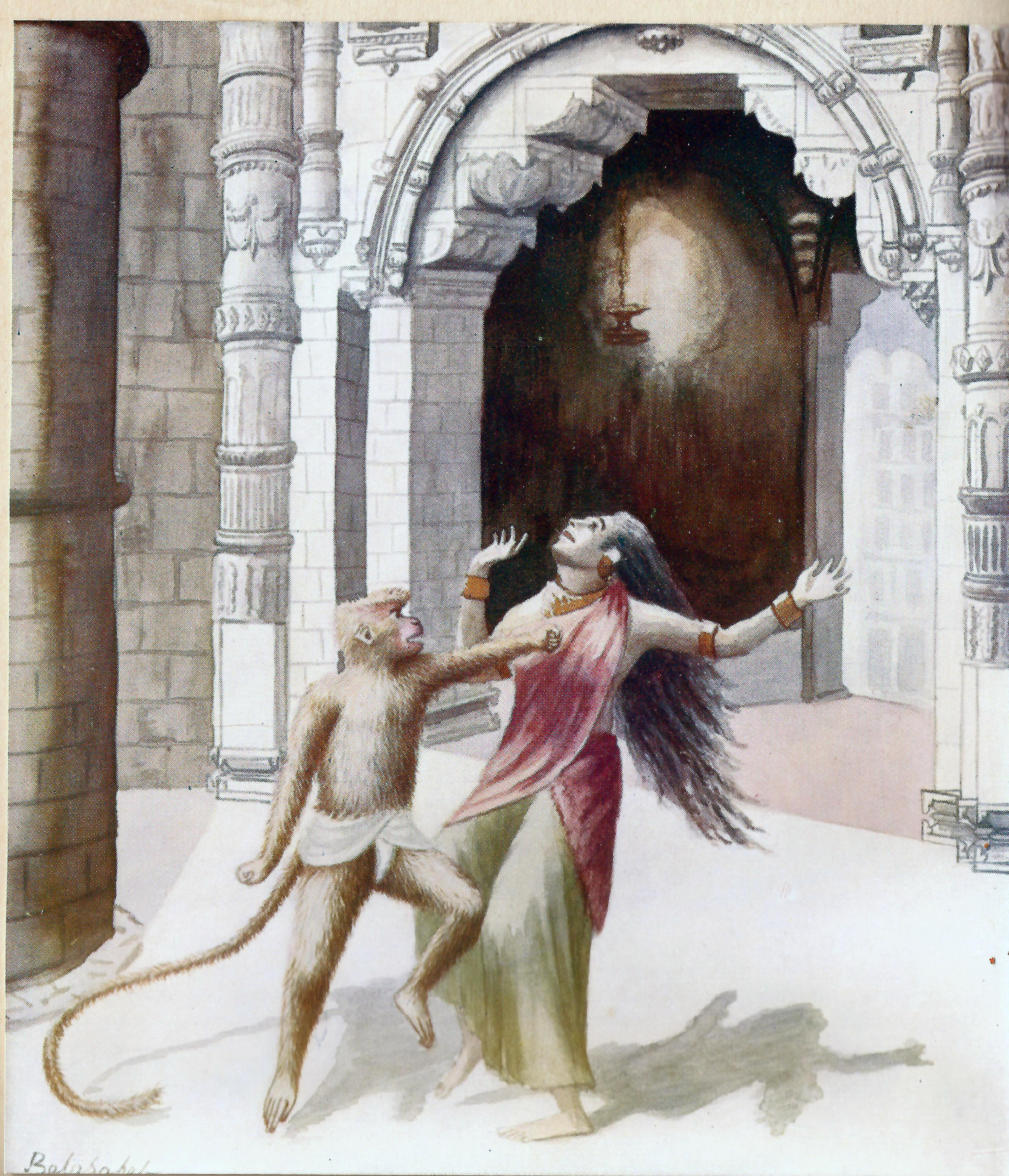 Chitra Ramayana (Illustrated Ramayana) is a simplified story of the great Indian epic in Kannada. The type is bold and beautiful. The thick pages have become brittle and need careful handling. Printed by B. Miller, Superintendent, British India, Press, Mazgaon, Bombay. It was published by, Shrimat Balasaheb Pandit Pant Pratinidhi, chief of Aundh, at Aundh, Satara district. The Kannada version is by Ramachandra Madhwa Mahishi The date shown is 1916. It is all the more important because the book contains illustrations painted by the publisher also called Bhavan Rao Shrinivas Rao, the ruler of the state of Aundh himself.